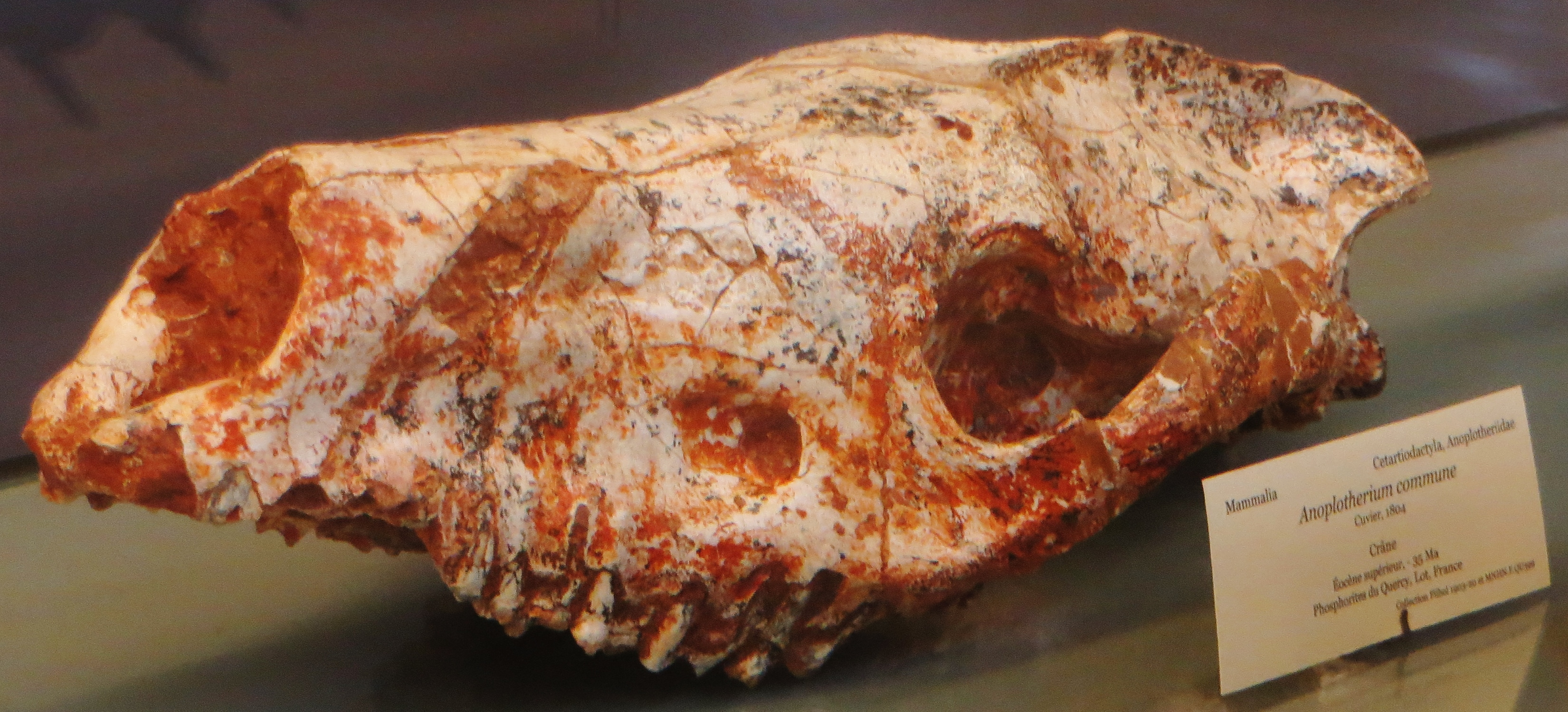 Anoplotherium fossil